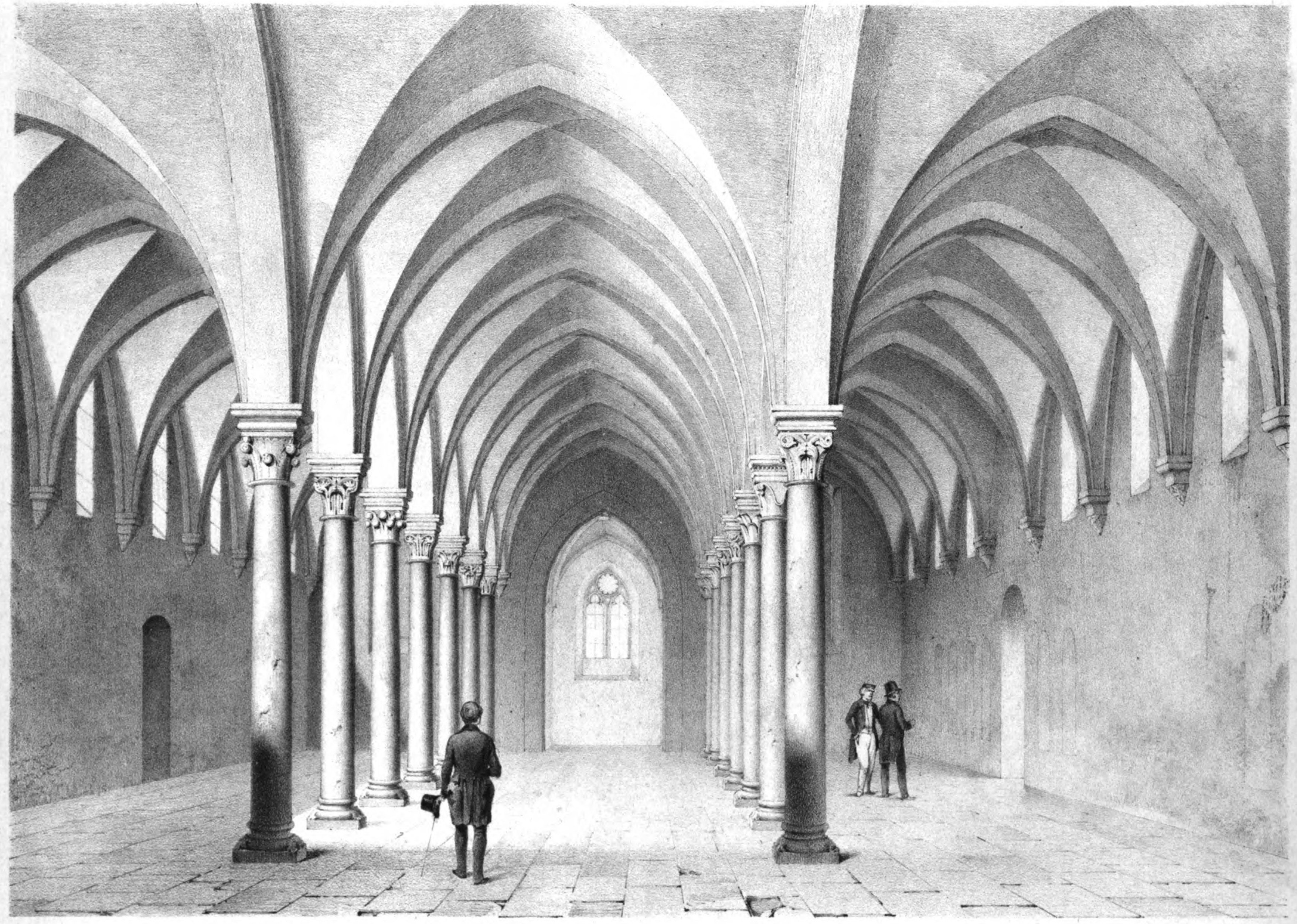 Innenansicht des alten Hospital des Klosters Eberbach, Rheingau, Deutschland